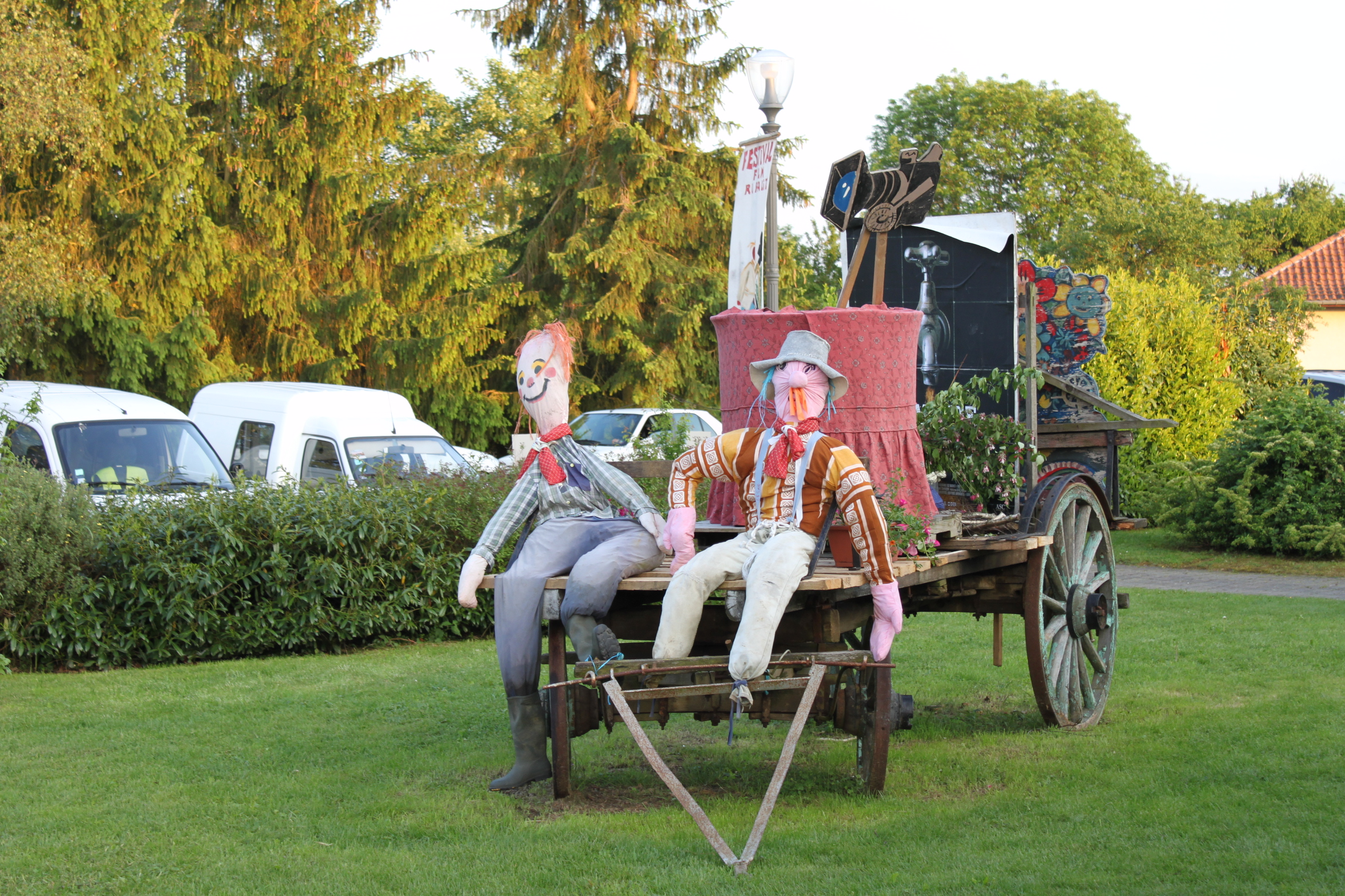 Accueil du festival Caméras des champs